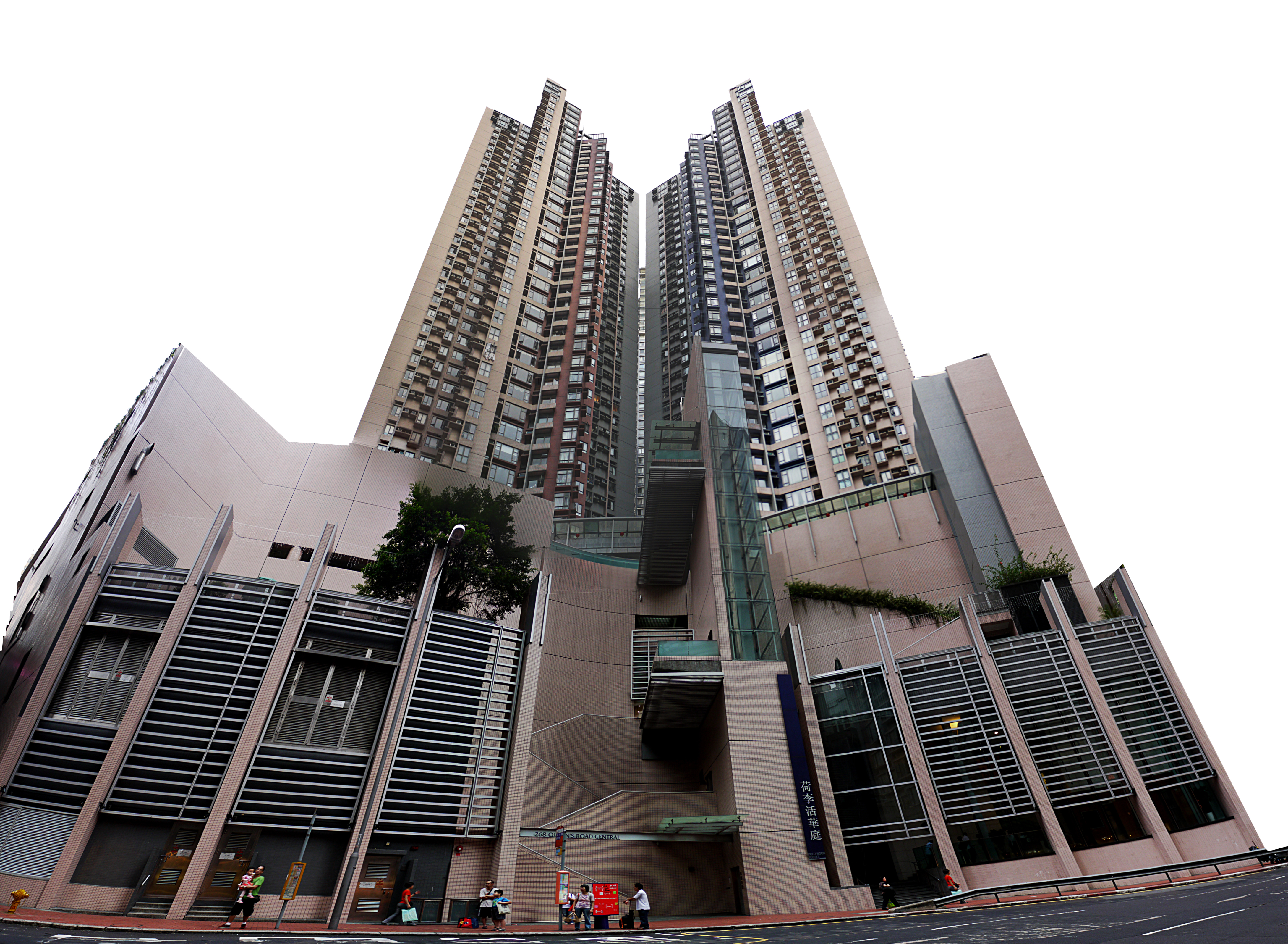 中文（香港）: 市區改善計劃---荷里活華庭